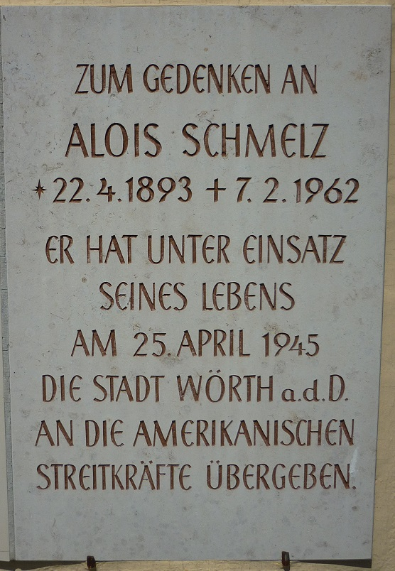 Gedenktafel Alois Schmelz Wörth Donau